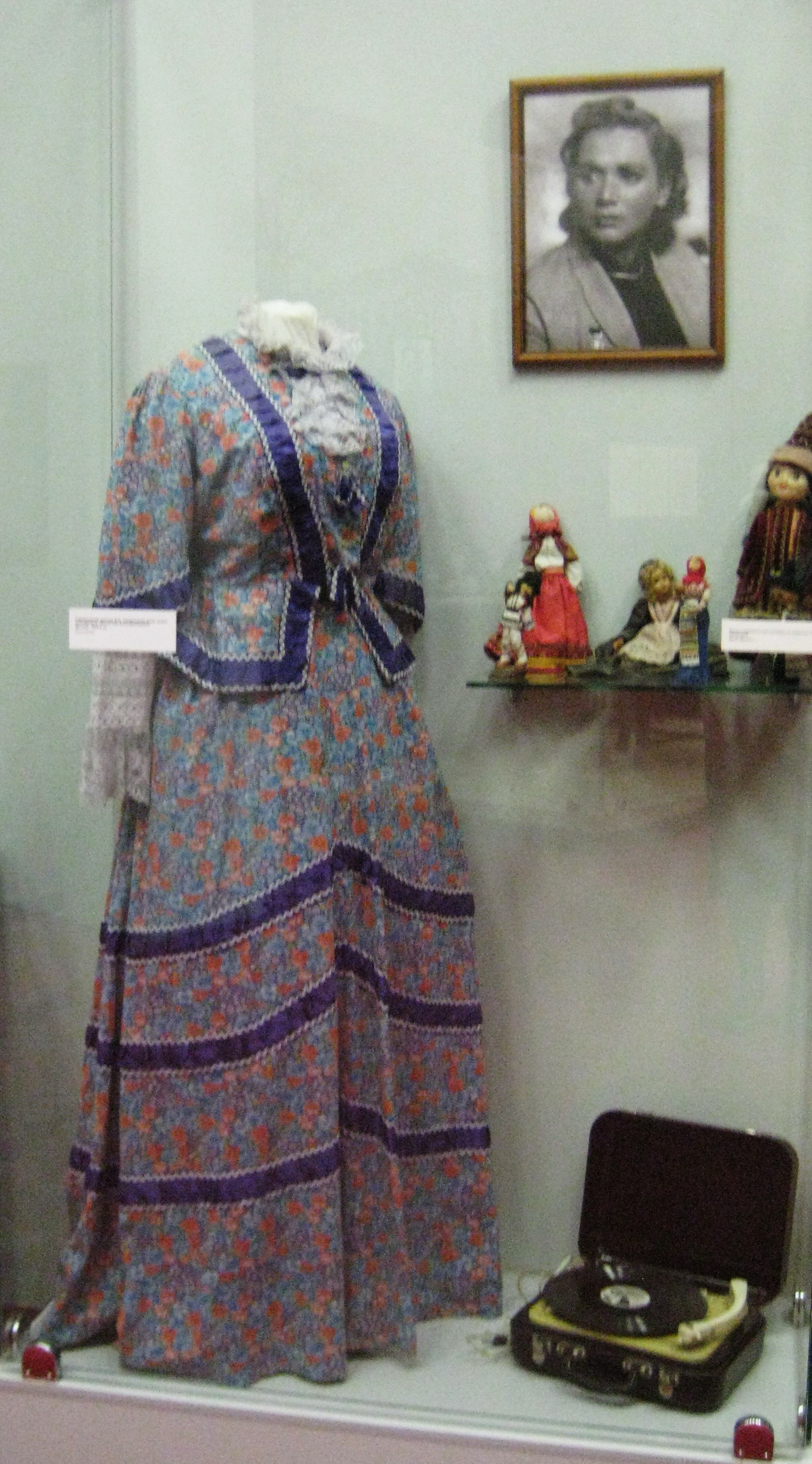 Музей Москвы (Провиантские склады)